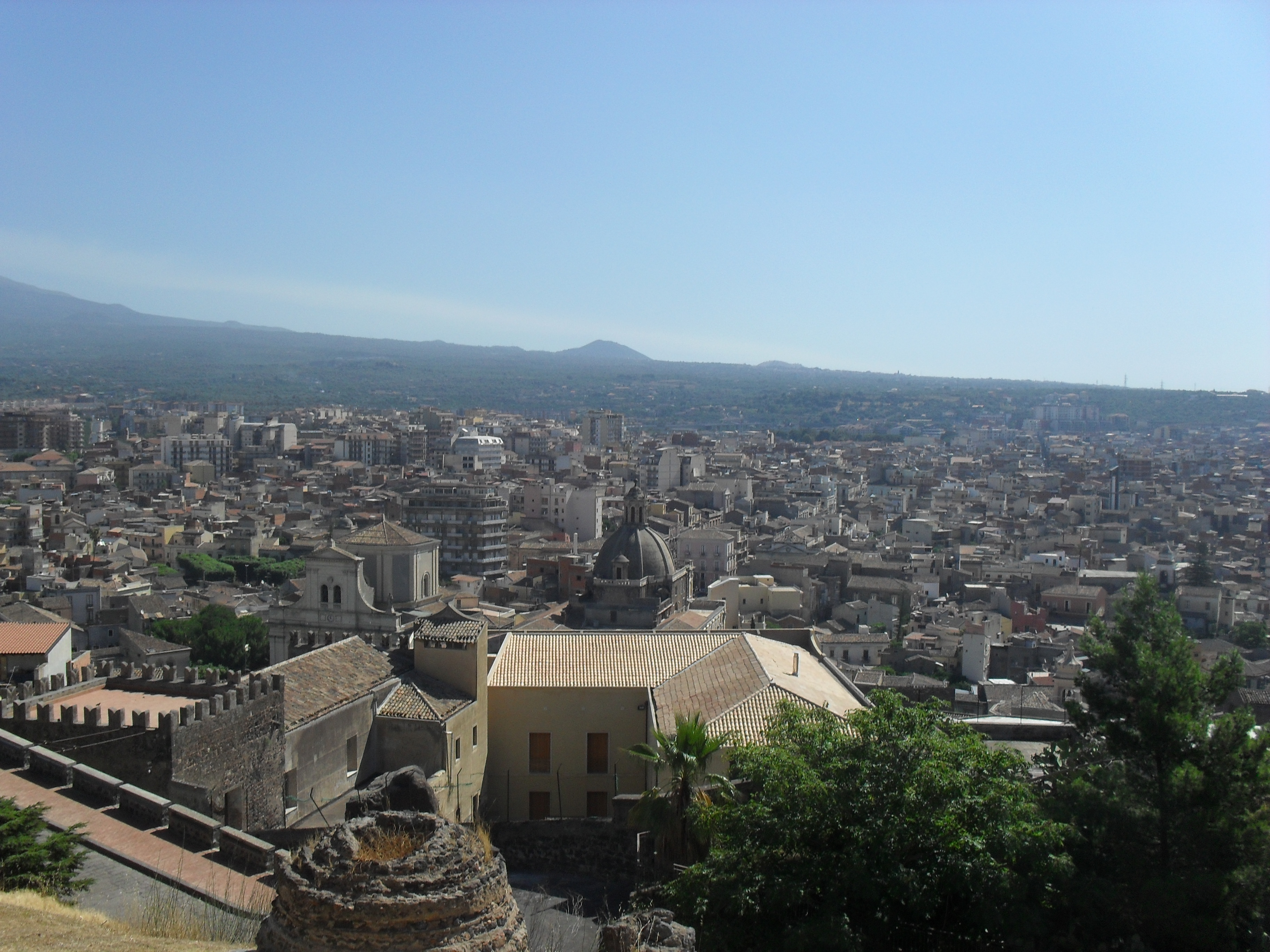 Paternò vista dalla Collina storica Summary Paternò vista dalla Collina storica